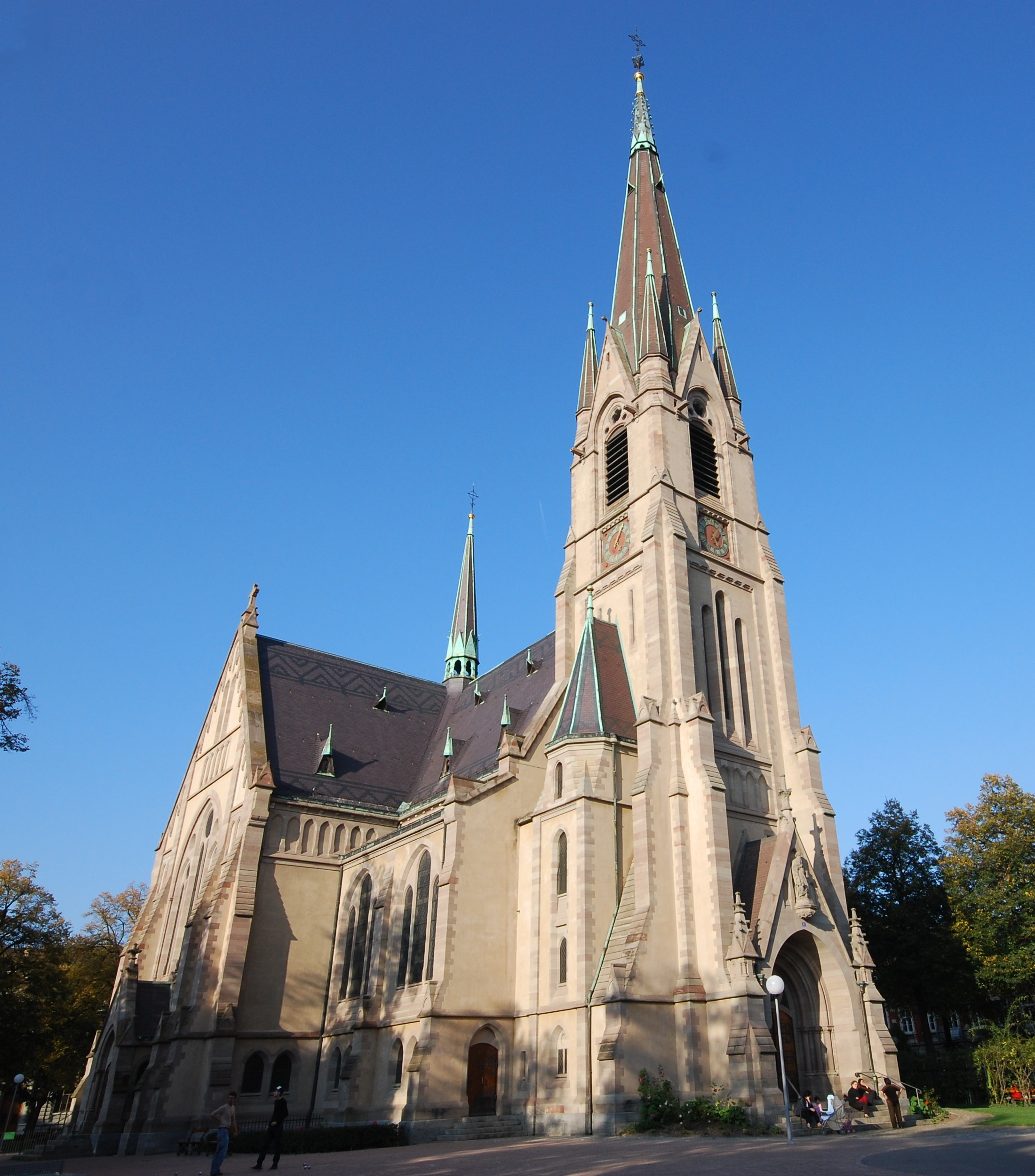 Matthäuskirche in Basel